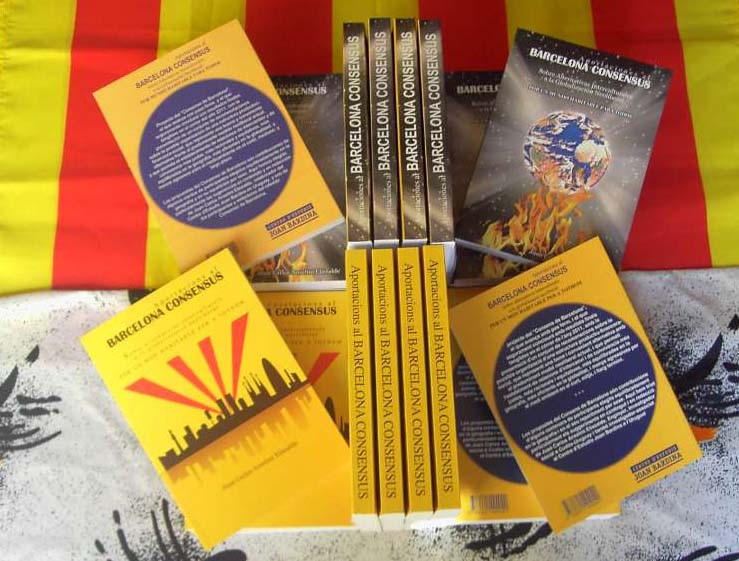 Foto de libros editados por Bardina